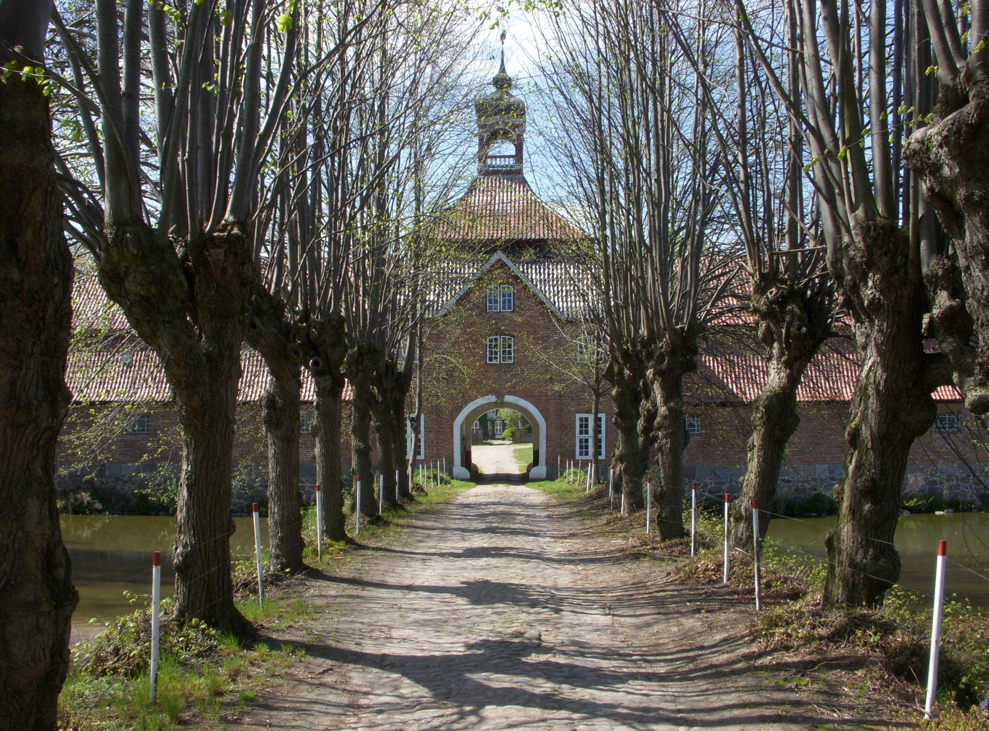 Gut Testorf, Torhaus und Allee